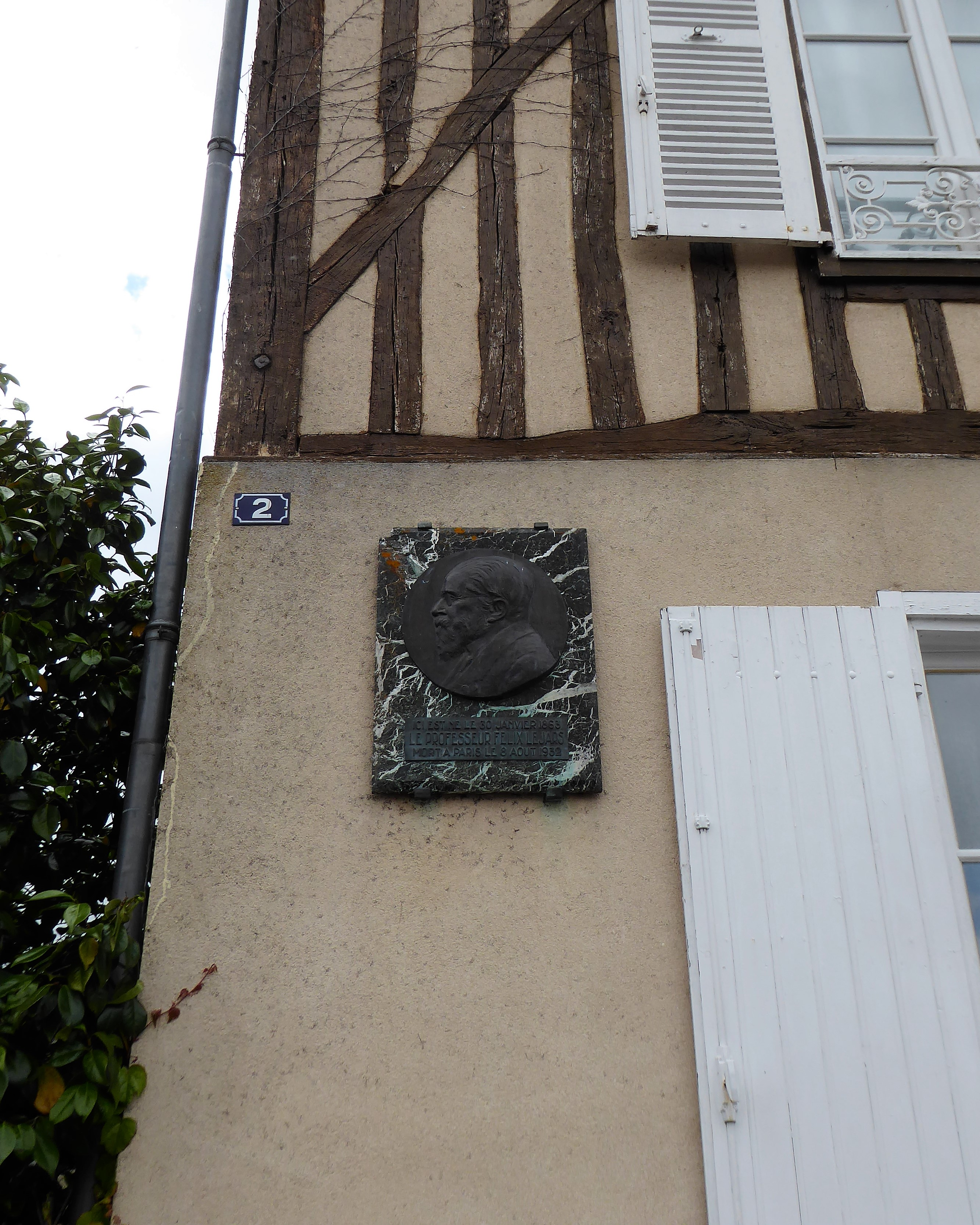 Plaque commémorative de la naissance du professeur Félix Lejars, 2 rue Lejars, Unverre, Eure-et-Loir, France.